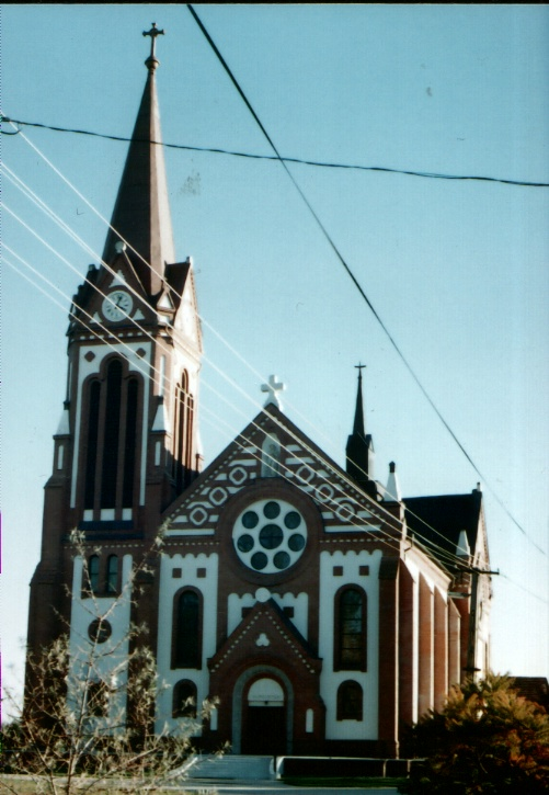 Szentlélek római katolikus templom Vállajon